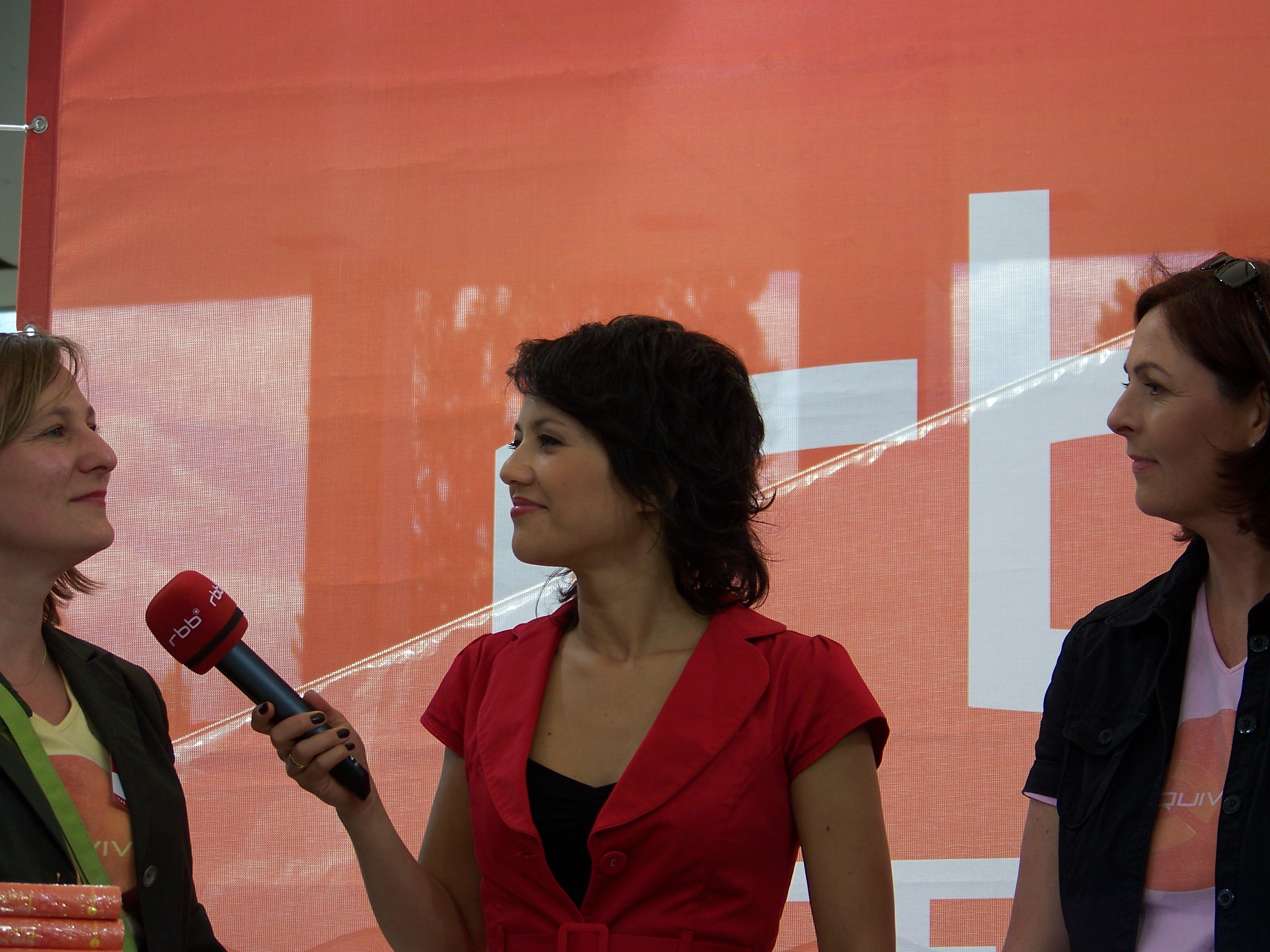 Madeleine Wehle - rbb Studios Berlin - 2008-24-05